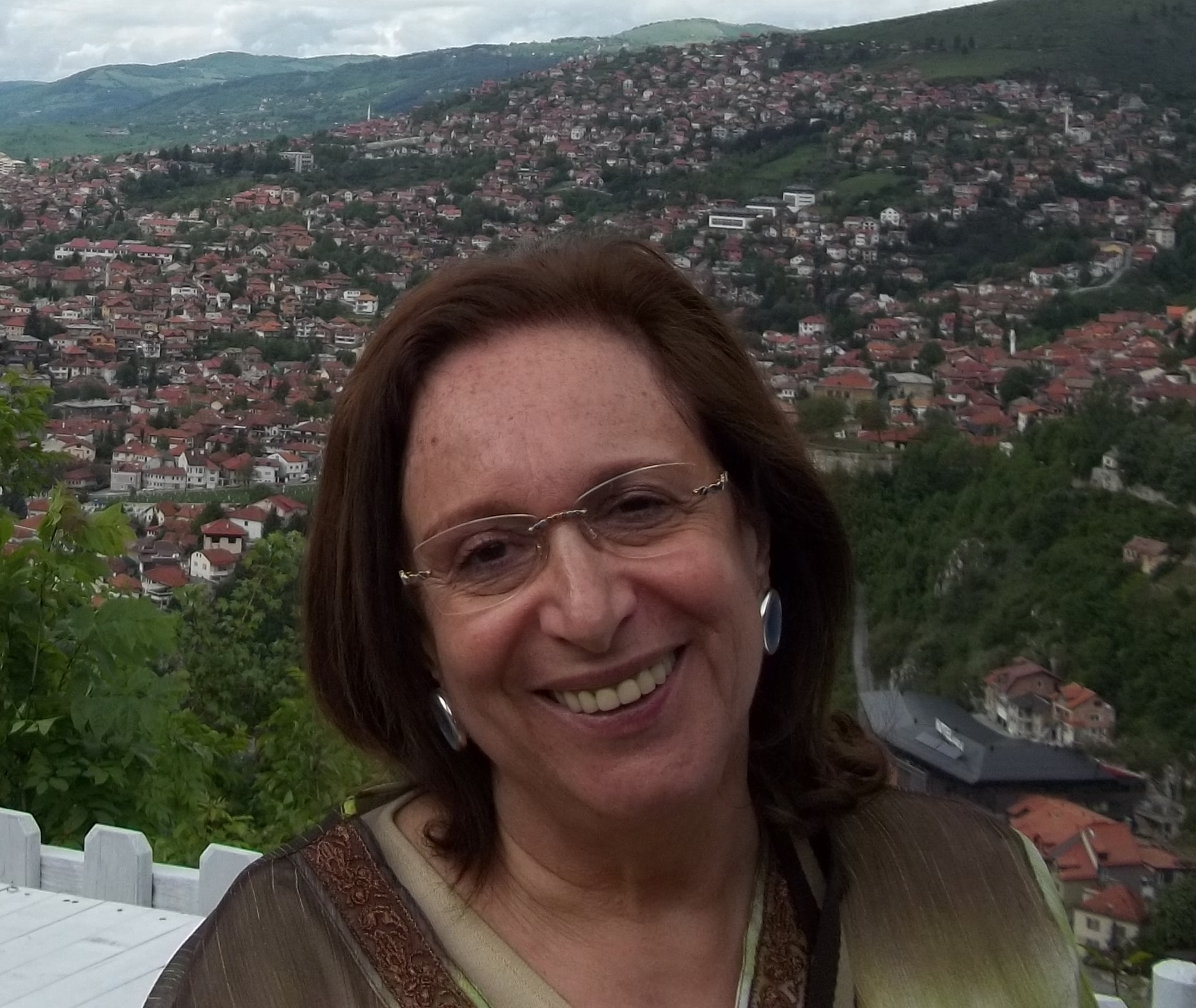 סופיה מנשה היא פרופסור באוניברסיטת חיפה ודיקן ללימודים מתקדמים